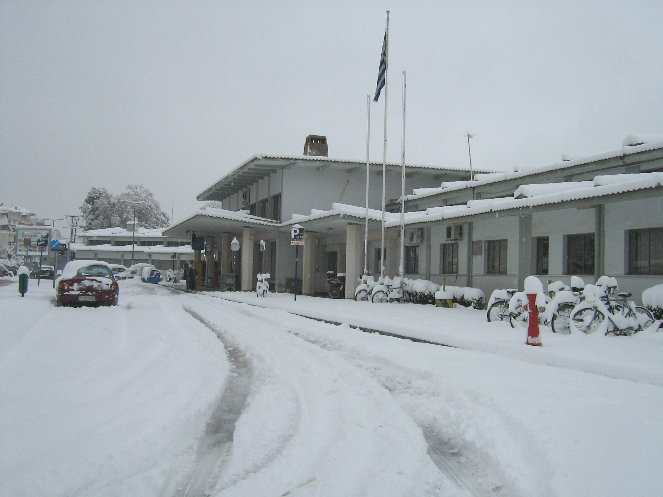 ΣΙΔΗΡ. ΣΤΑΘΜΟΣ ΛΑΡΙΣΑΣ 16-12-2010